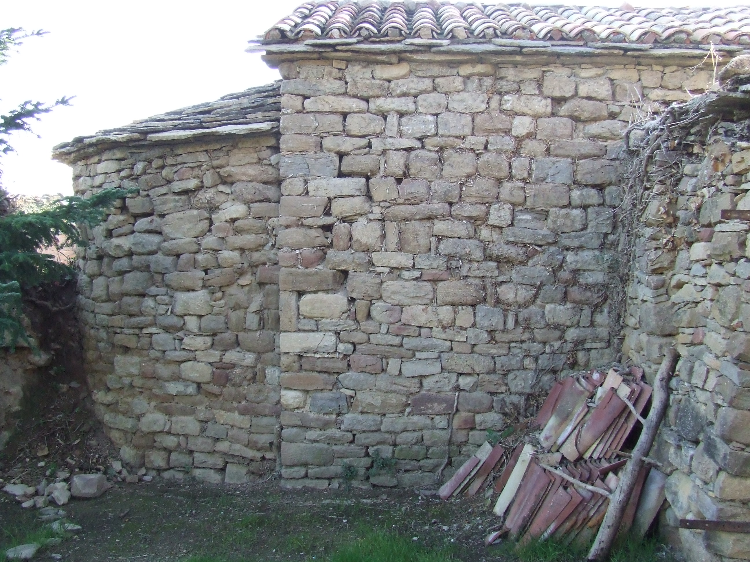 Absis de Sant Martí dels Masos de Sant Martí (Isona, Isona i Conca Dellà, Pallars Jussà)